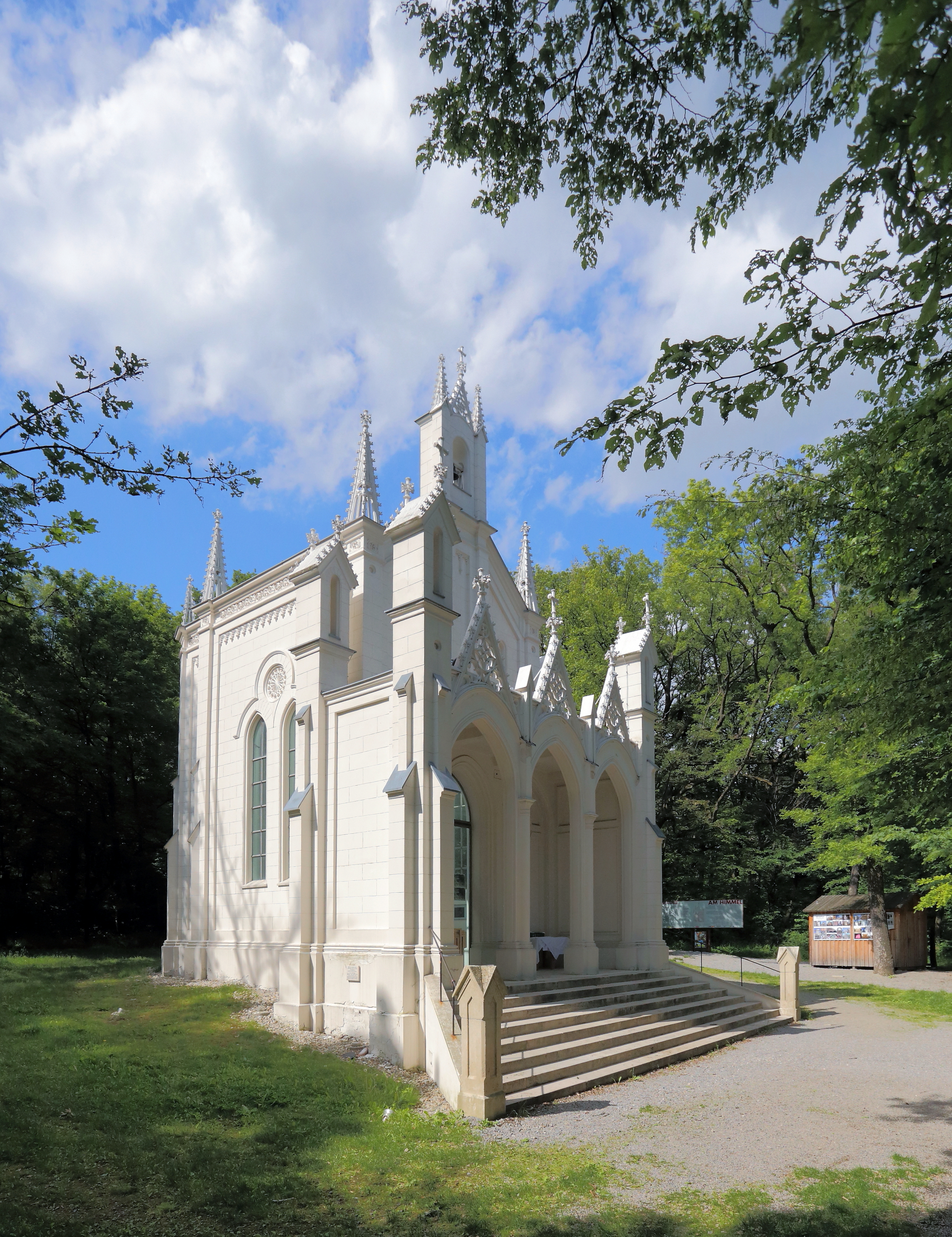 Die Kapelle hl. Elisabeth am Himmel, auch Sis(s)i-Kapelle bezeichnet, im Wiener Gemeindebezirk Döbling. Die neogotische Kapelle wurde anlässlich der Vermählung des Kaiserpaares in den Jahren 1854 bis 1856 errichtet. Im Zweiten Weltkrieg wurde die Kapelle stark beschädigt, danach dem Verfall preisgegeben und Mitte der 2000er Jahre wiederinstandgesetzt bzw. renoviert.